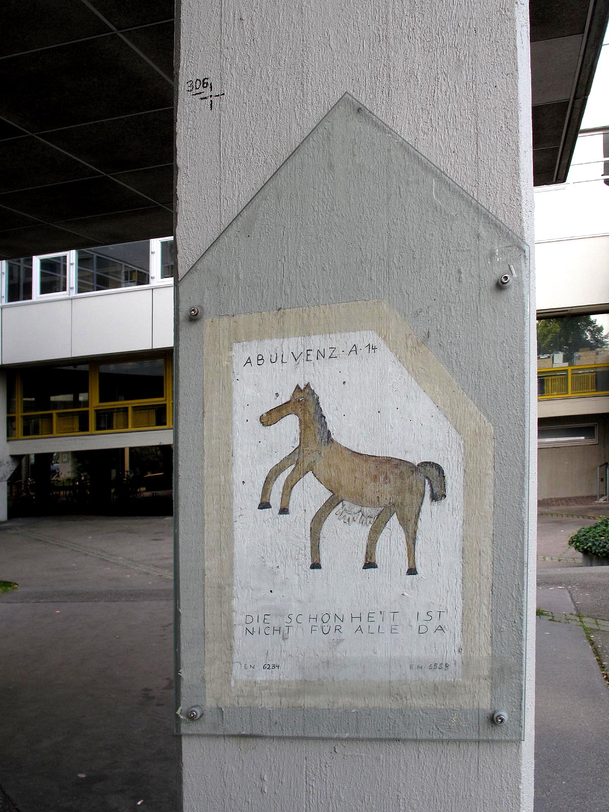 Fritz Schwegler, Bilderzyklus Abulvenz Aushang, (Mineralfarbe auf Betonwänden und Säulen) Bild 14, Stuttgart-Vaihingen, Campus der Universität